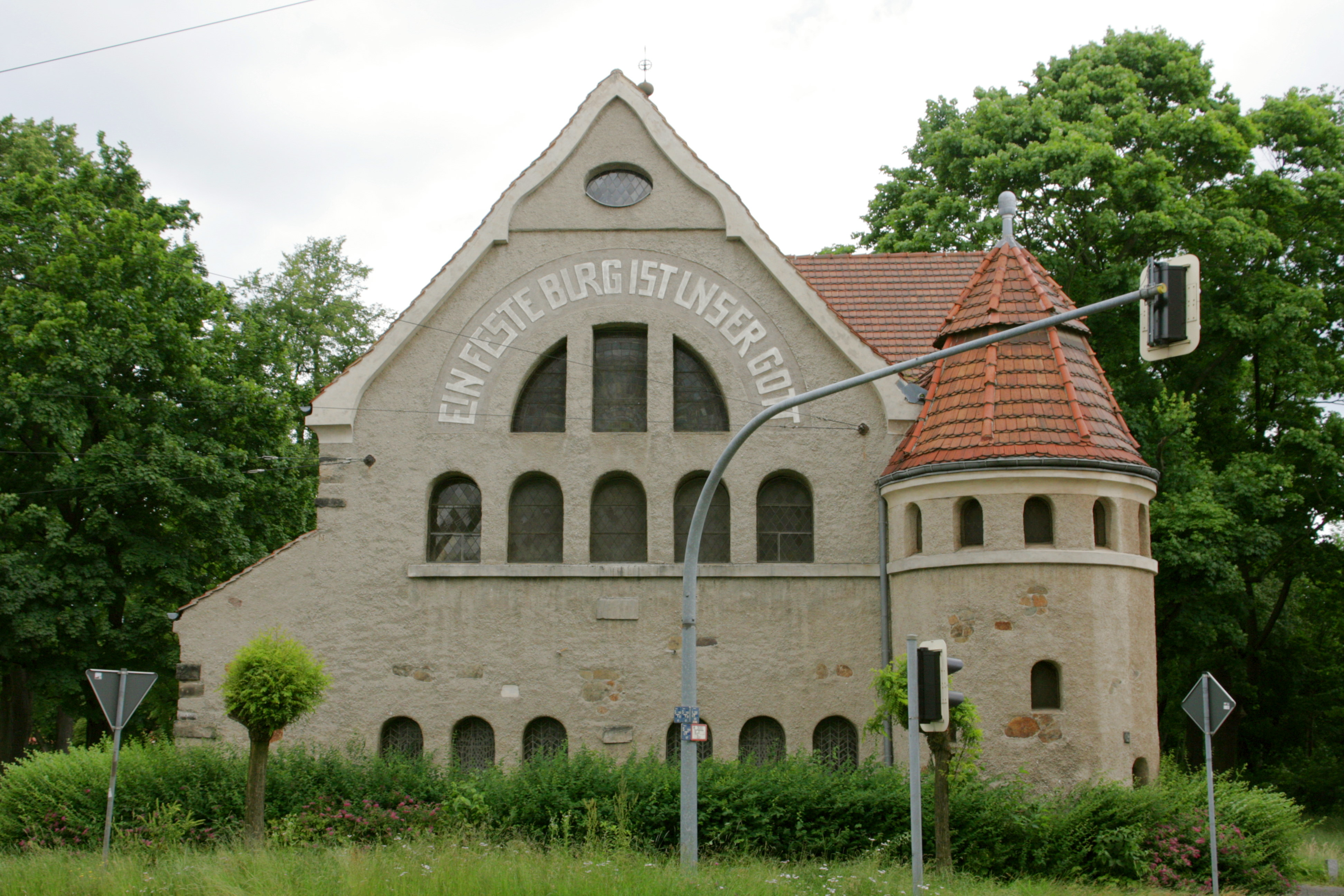 Heilig-Geist-Kirche, Ecke An der Jakobuskirche / Zittauer Straße in Görlitz